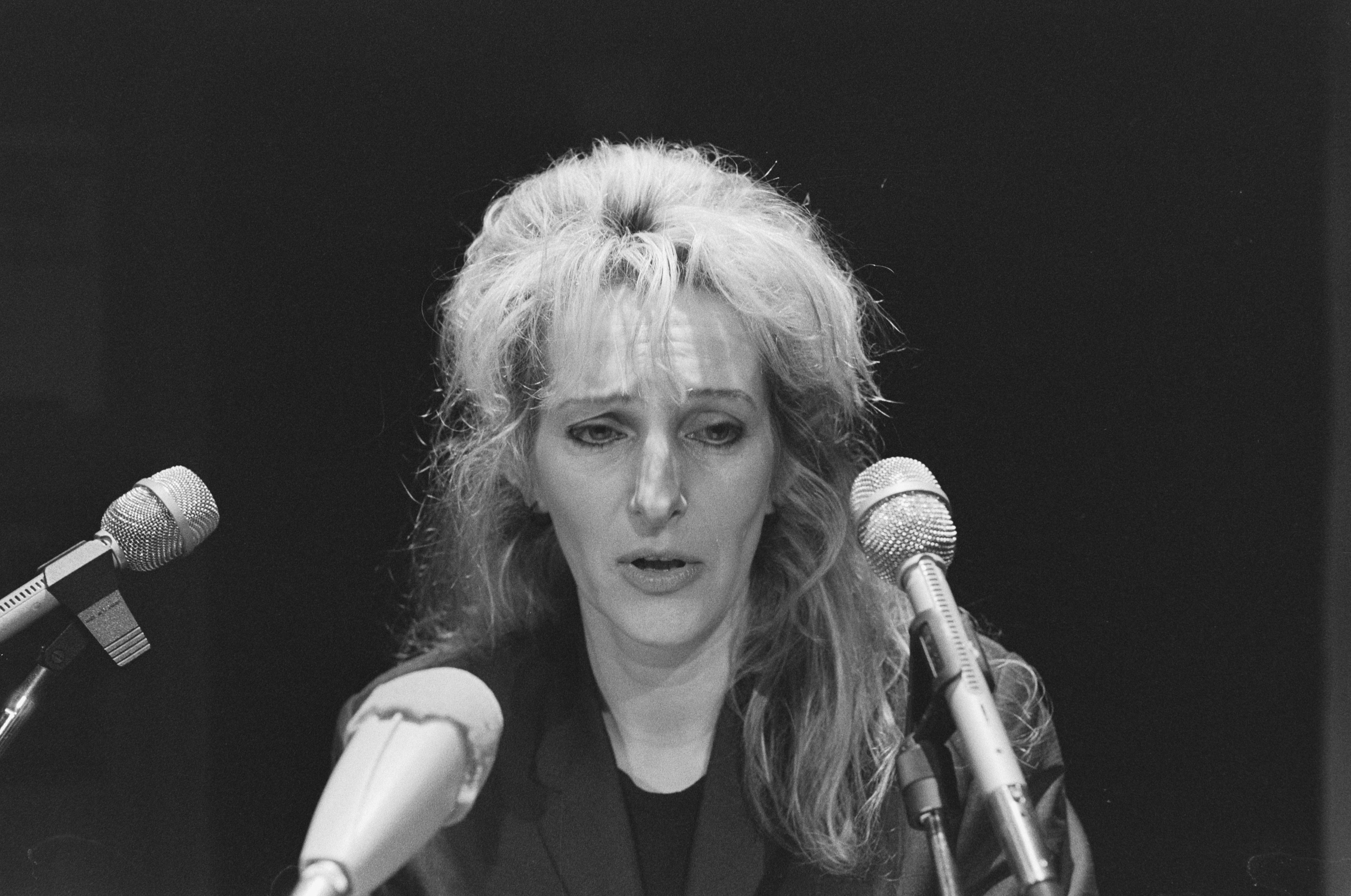 Collectie / Archief : Fotocollectie Anefo Reportage / Serie : [ onbekend ] Beschrijving : Boekenweek 1987: Tessa de Loo , kop Datum : 23 februari 1987 Trefwoorden : BOEKENWEKEN Fotograaf : Gerrits, Roland / Anefo Auteursrechthebbende : Nationaal Archief Materiaalsoort : Negatief (zwart/wit) Nummer archiefinventaris : bekijk toegang 2.24.01.05 Bestanddeelnummer : 933-9015